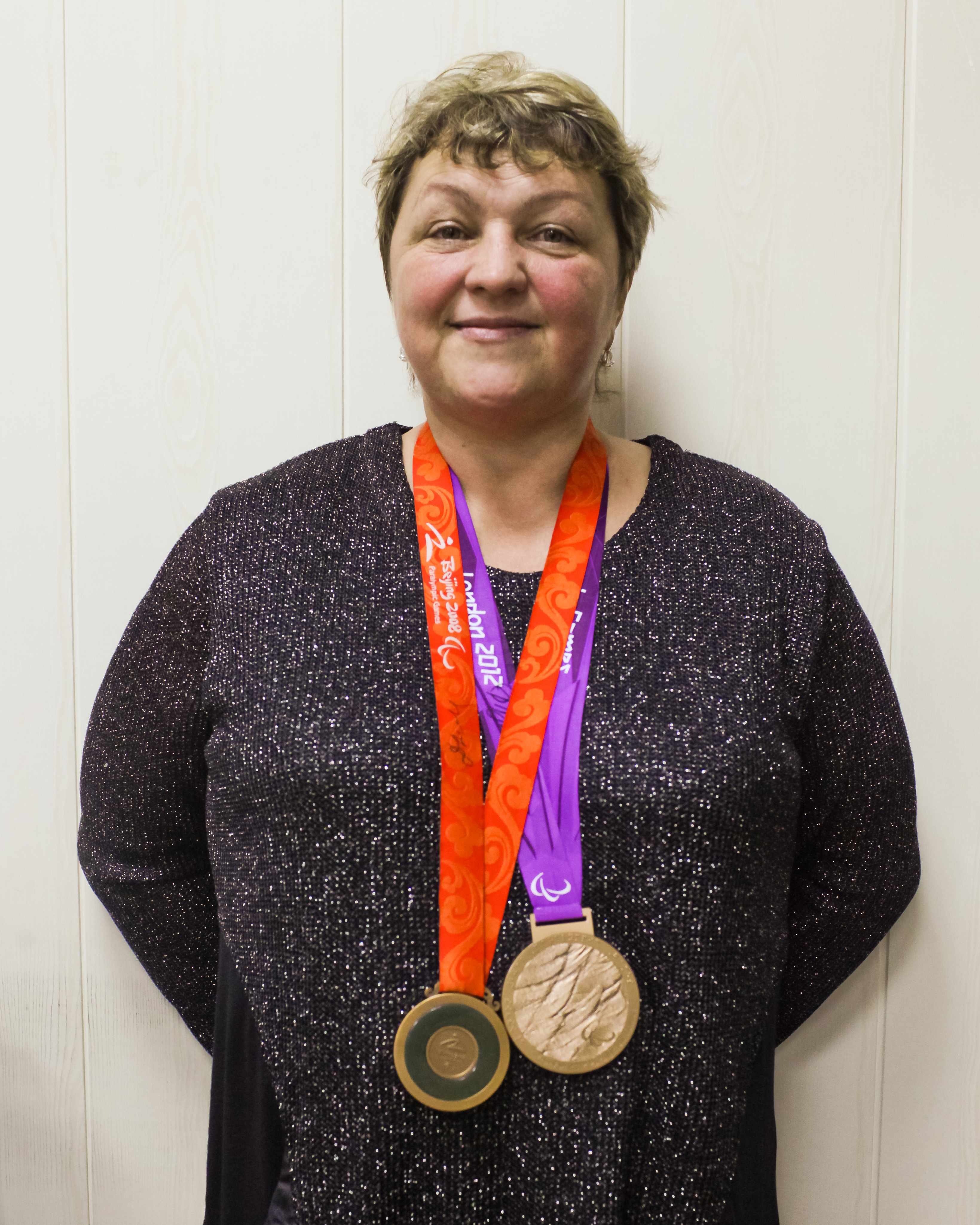 Ирина Кальянова - дзюдоист-паралимпиец. Дважды бронзовый призёр Паралимпийских игр